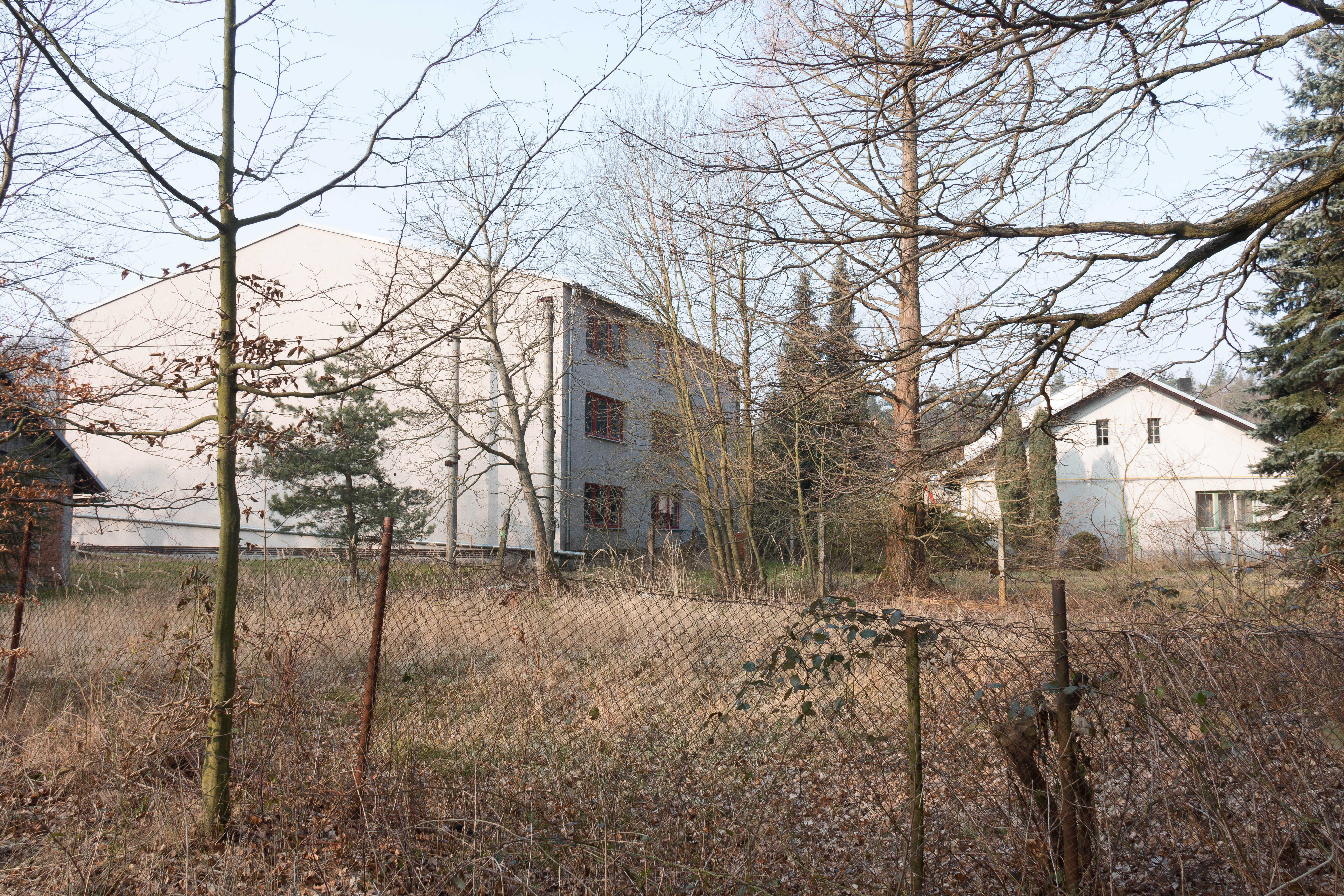 Libáň areal pily